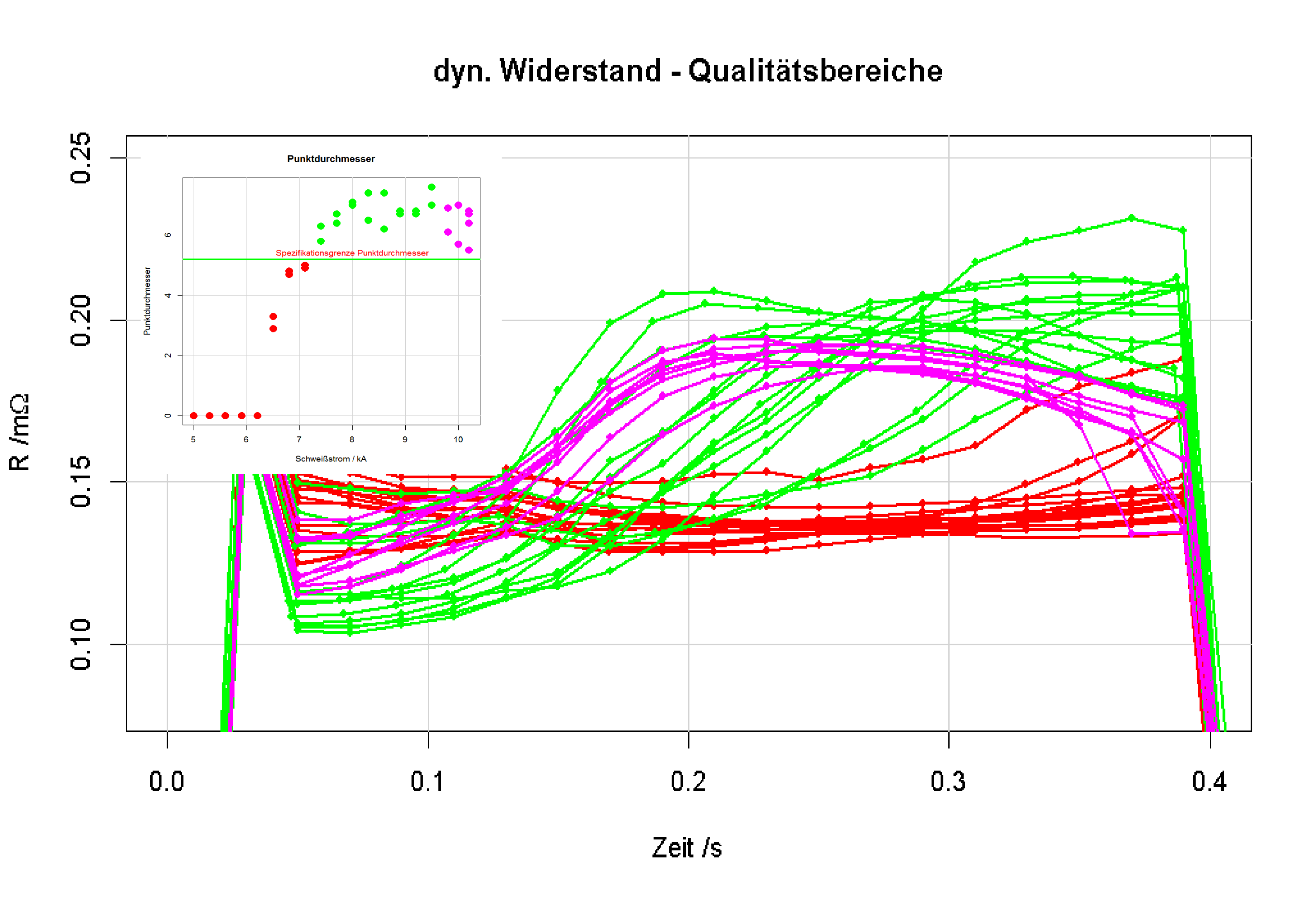 Dynamischer Widerstand und Punktdurchmesser bei wachendem Energieeintrag beim Widerstandspunktschweißen